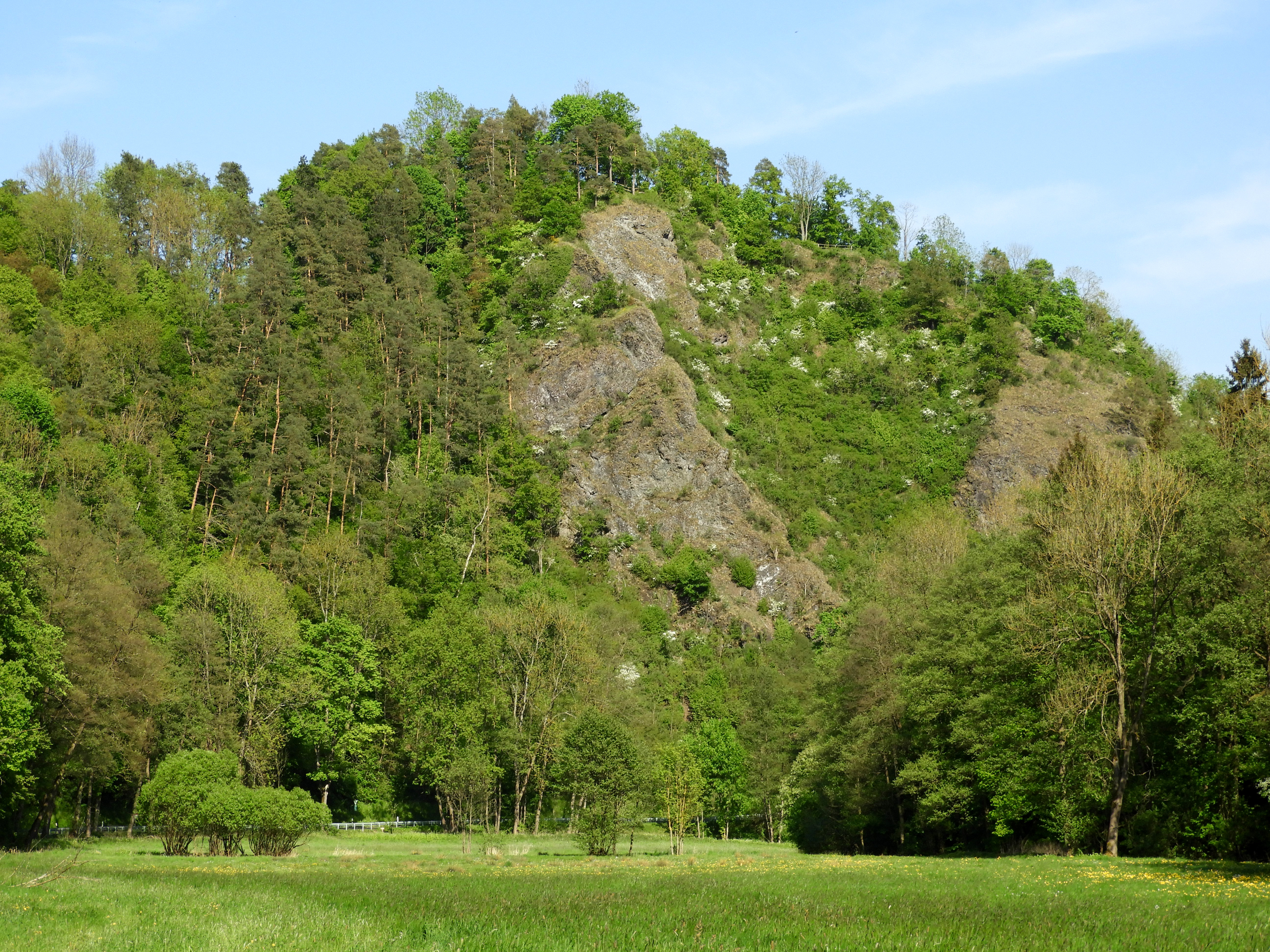 Die schroffen Felsen des Bilsteins liegen im östlichen Meißnervorland im Gemeindegebiet des Eschweger Stadtteils Albungen im Werra-Meißner-Kreis. Vom Tal der Berka steigt der Bilstein von 180 m auf 284,3 m über NN steil an. Das Berkatal zwischen Frankershausen und Albungen, das in diesem Teil "Höllental" genannt wird, ist hier eng und steilwandig. Beidseitig ragen steile Klippen aus hartem Diabasgestein auf. Den ersten Schutzstatus erhielt der Bilstein schon vor über 100 Jahren, in 1914, wegen seiner geologischen und botanischen Besonderheiten. In 1960 folgte die Ausweisung zum Naturschutzgebiet mit einer Fläche von 3,19 Hektar und dem WDPA ID-Code 81402. Mit gleichen Gebietsgrenzen und Erhaltungszielen wurde der Bilstein dann in 2008 als Fauna-Flora-Habitat-Gebiet mit der Nr. 4725-303 Teil des europäischen Schutzgebietsnetzwerkes Natura 2000. Das Gebiet gehört zum Geo-Naturpark Frau-Holle-Land.